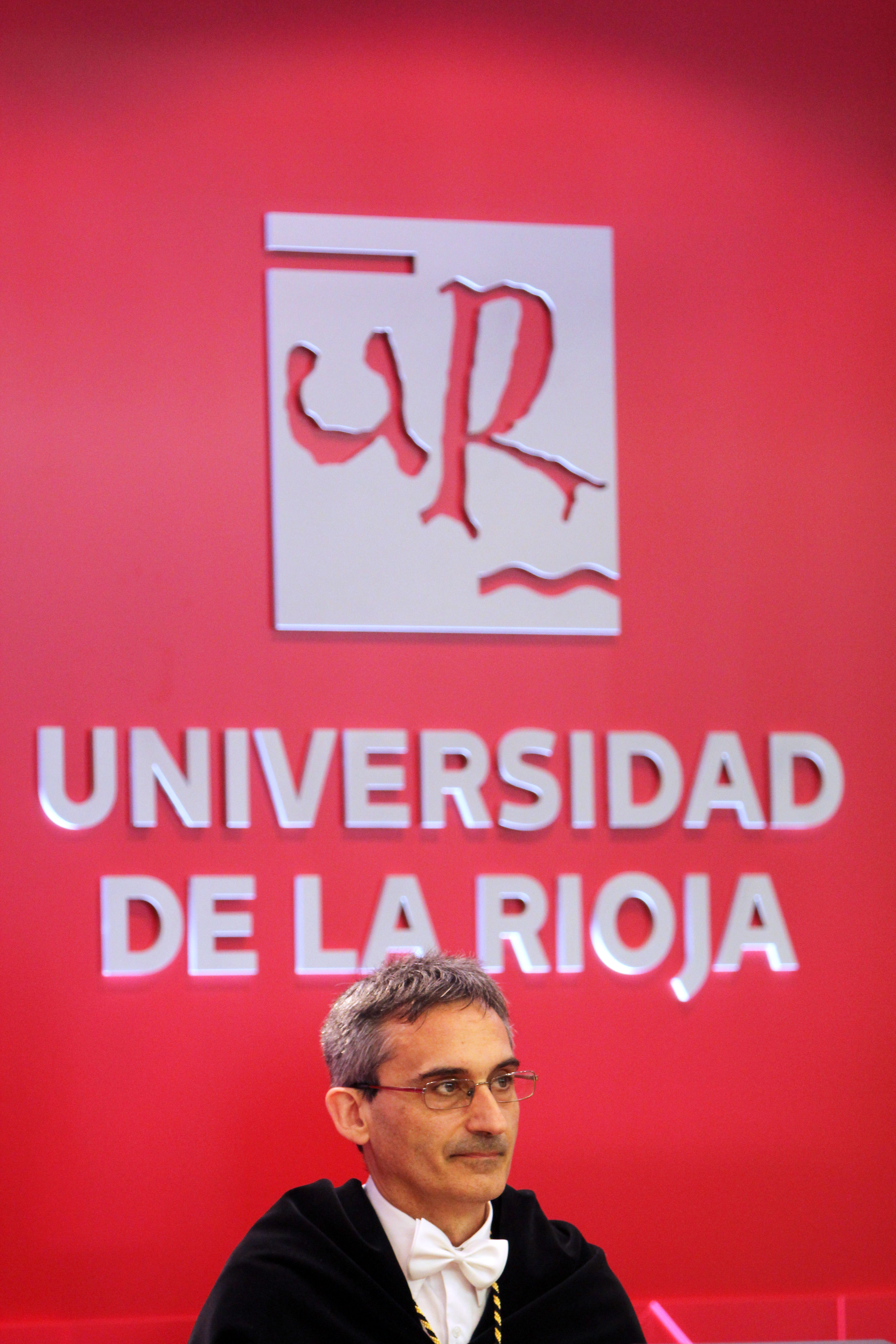 Julio Rubio García, rector de la Universidad de La Rioja.